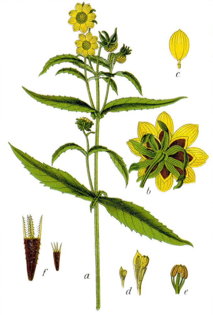 FloraWeb.de: Nickender Zweizahn, Bidens cernua L. Original Caption Nickender Zweizahn, Bidens cernuus